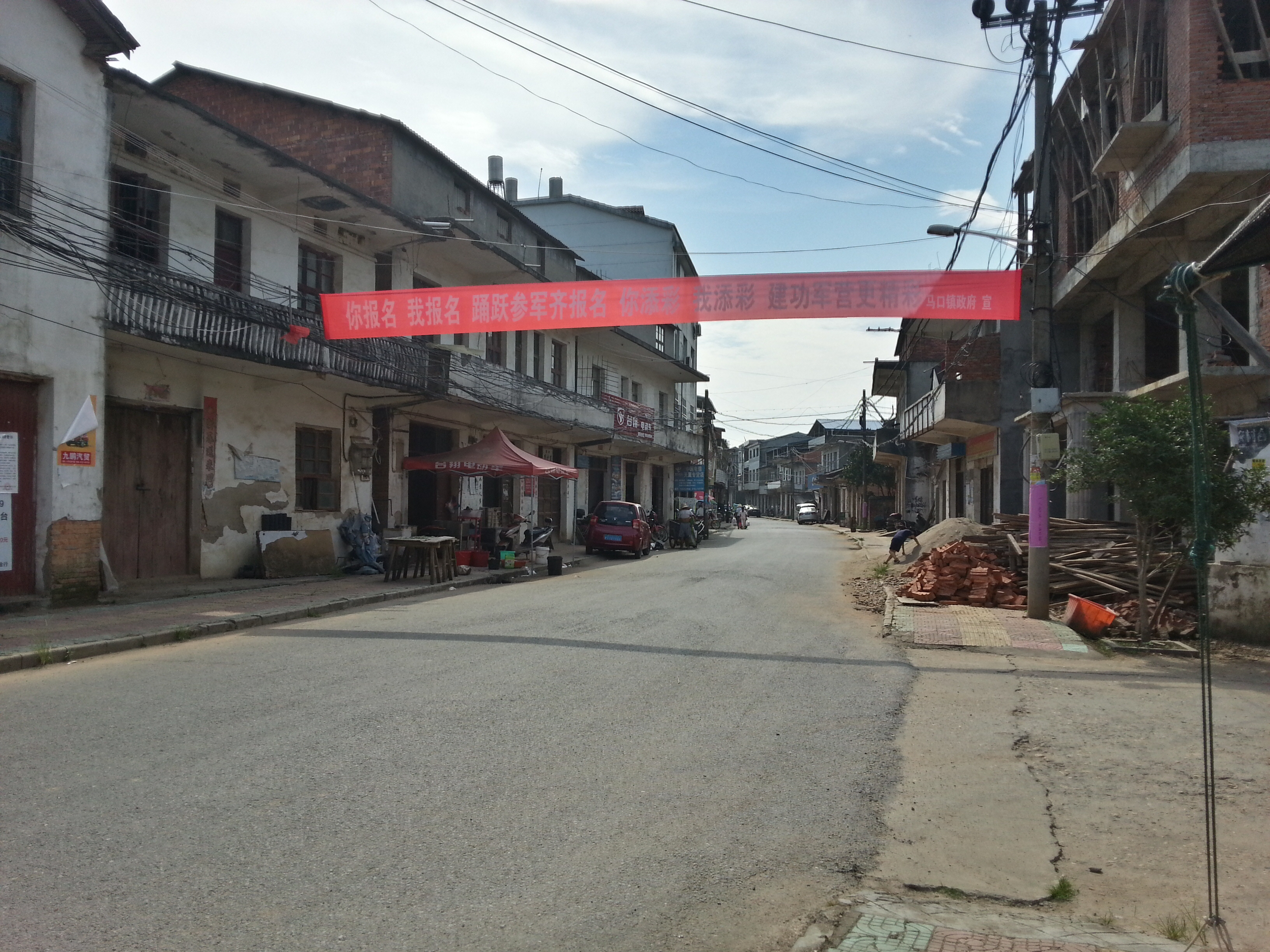 去往馬口大街